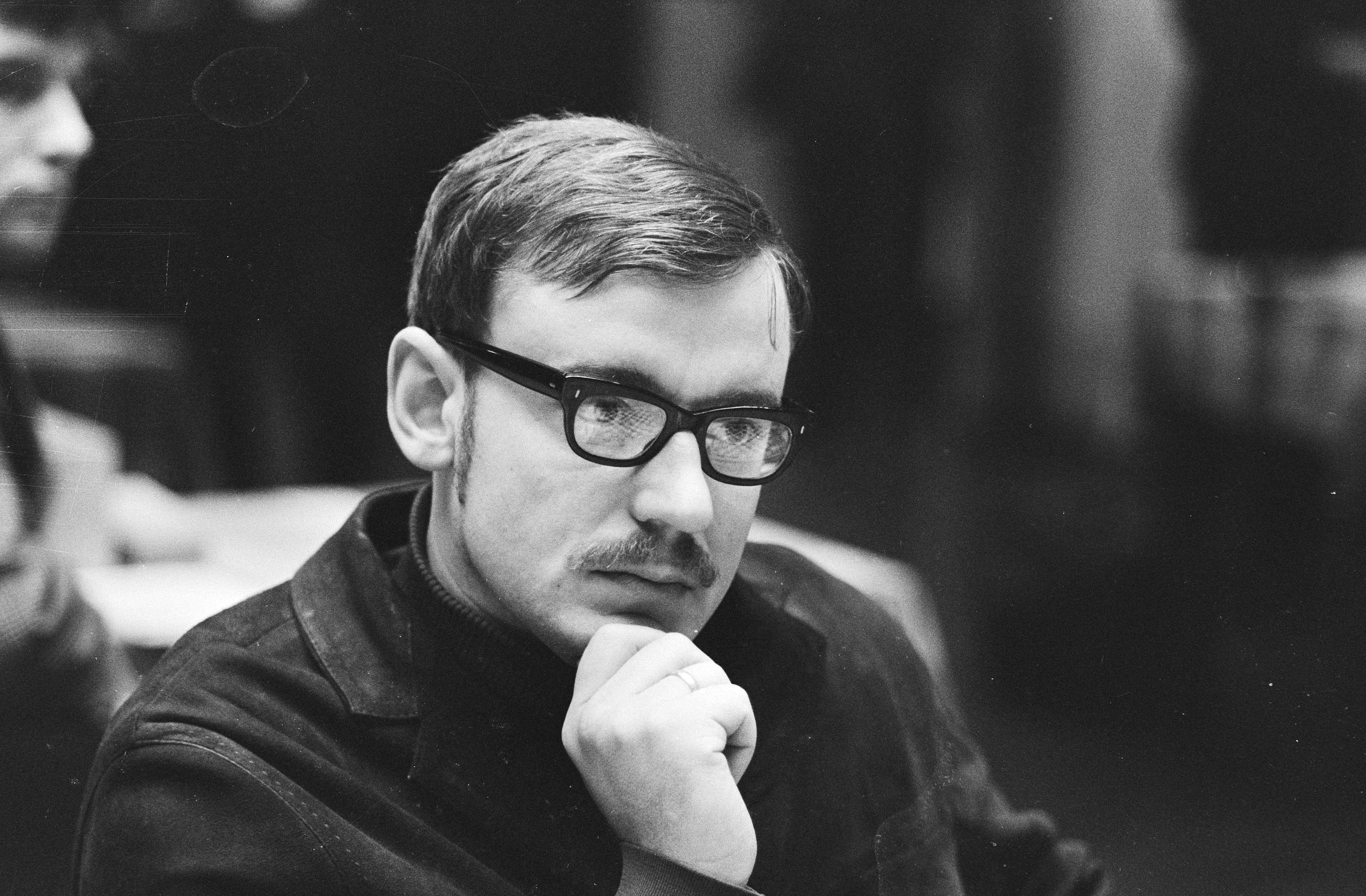 Collectie / Archief : Fotocollectie Anefo Reportage / Serie : [ onbekend ] Beschrijving : Tweede Internationale Suiker Damtoernooi , Amsterdam; Andris Andreiko (USSR), kop, nr. 7: Baba Sy Datum : 18 december 1970 Locatie : Amsterdam, Noord-Holland Trefwoorden : dammen Persoonsnaam : andrik andreiko Fotograaf : Evers, Joost / Anefo Auteursrechthebbende : Nationaal Archief Materiaalsoort : Negatief (zwart/wit) Nummer archiefinventaris : bekijk toegang 2.24.01.05 Bestanddeelnummer : 924-1064